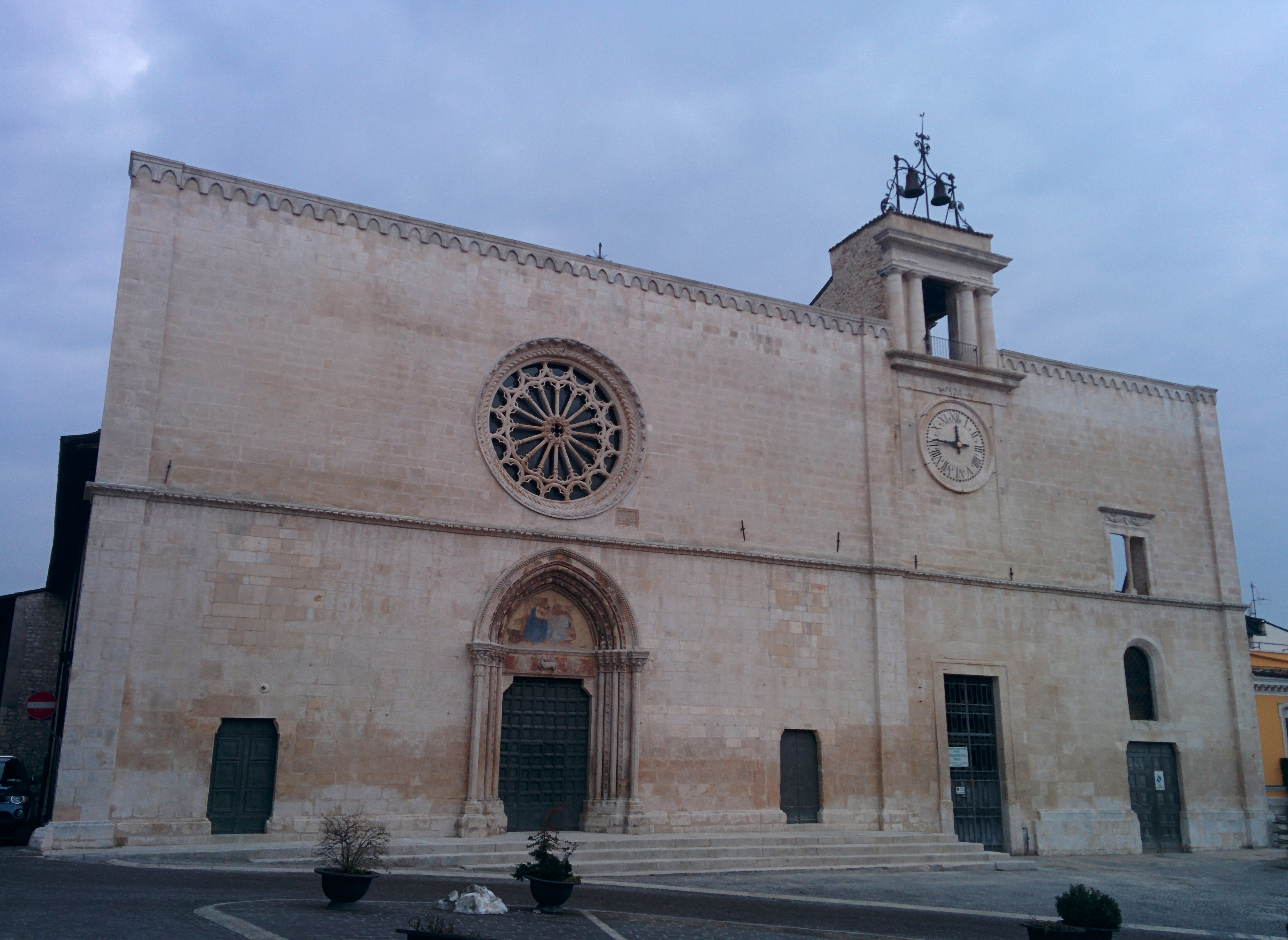 Facciata della Chiesa